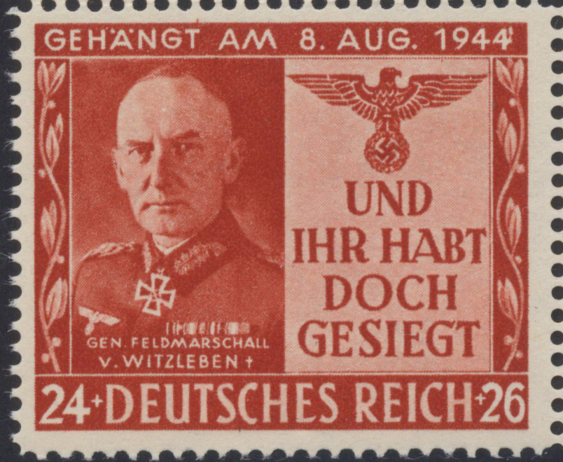 Britische Propagandafälschung für Deutschland der Mi. Nr. 863: Bild des Generals v. Witzleben eingefügt, der 1944 gehängt wurde.